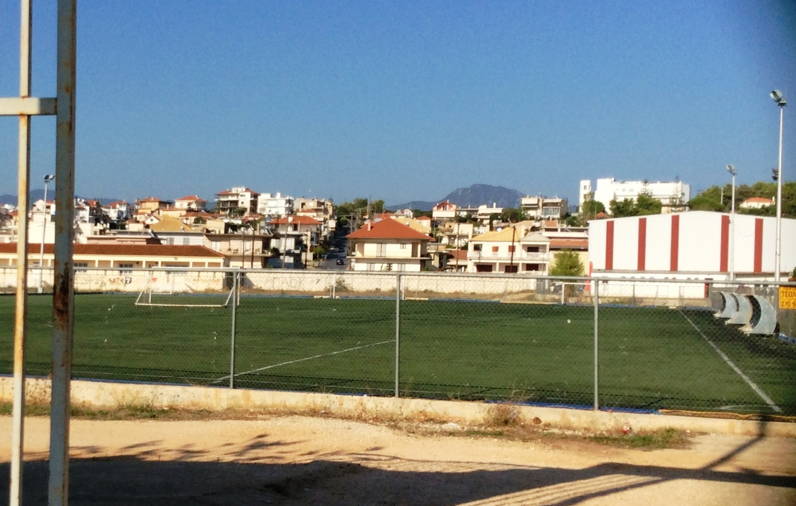 Γαργαλιάνοι Μεσσηνίας. Το Δημοτικό Στάδιο των Γαργαλιάνων "Τέλος Άγρας".